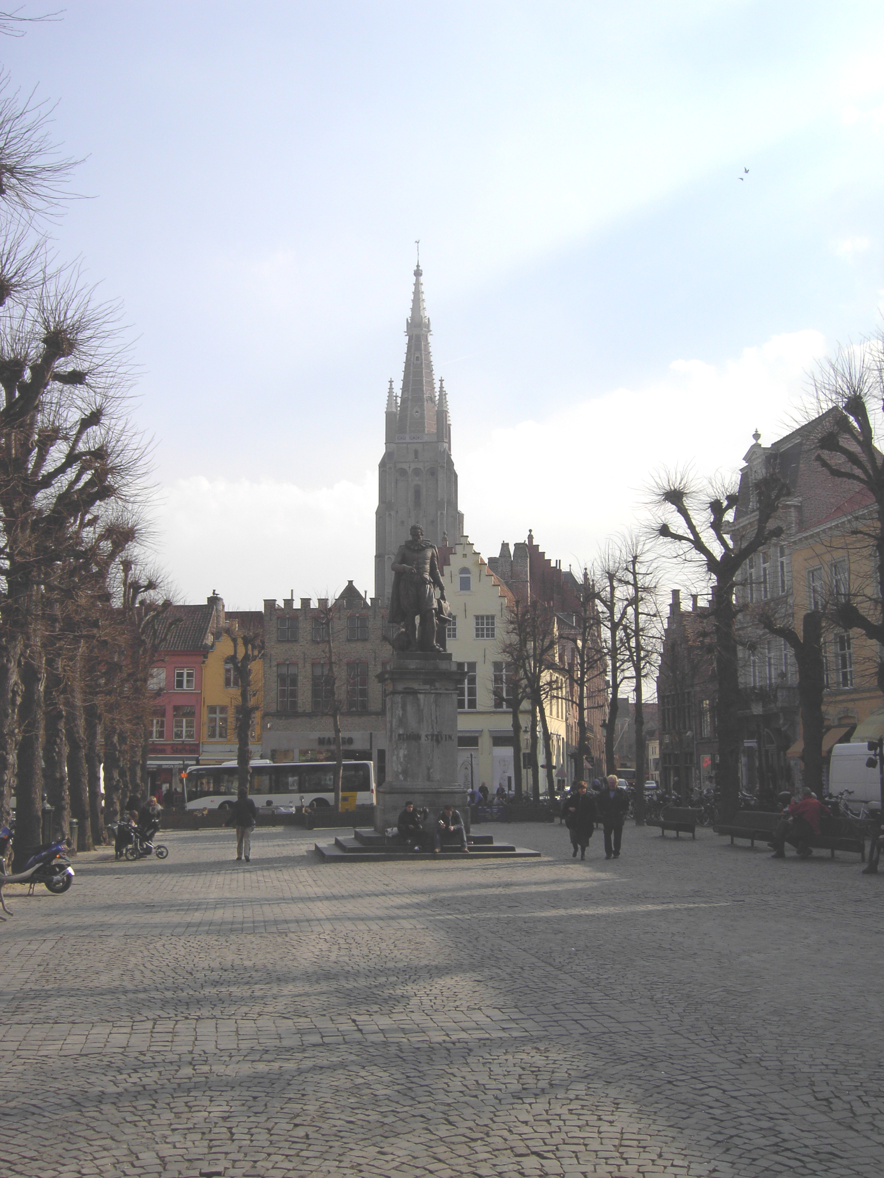 Brugge in Belgium - Simon Stevinplein